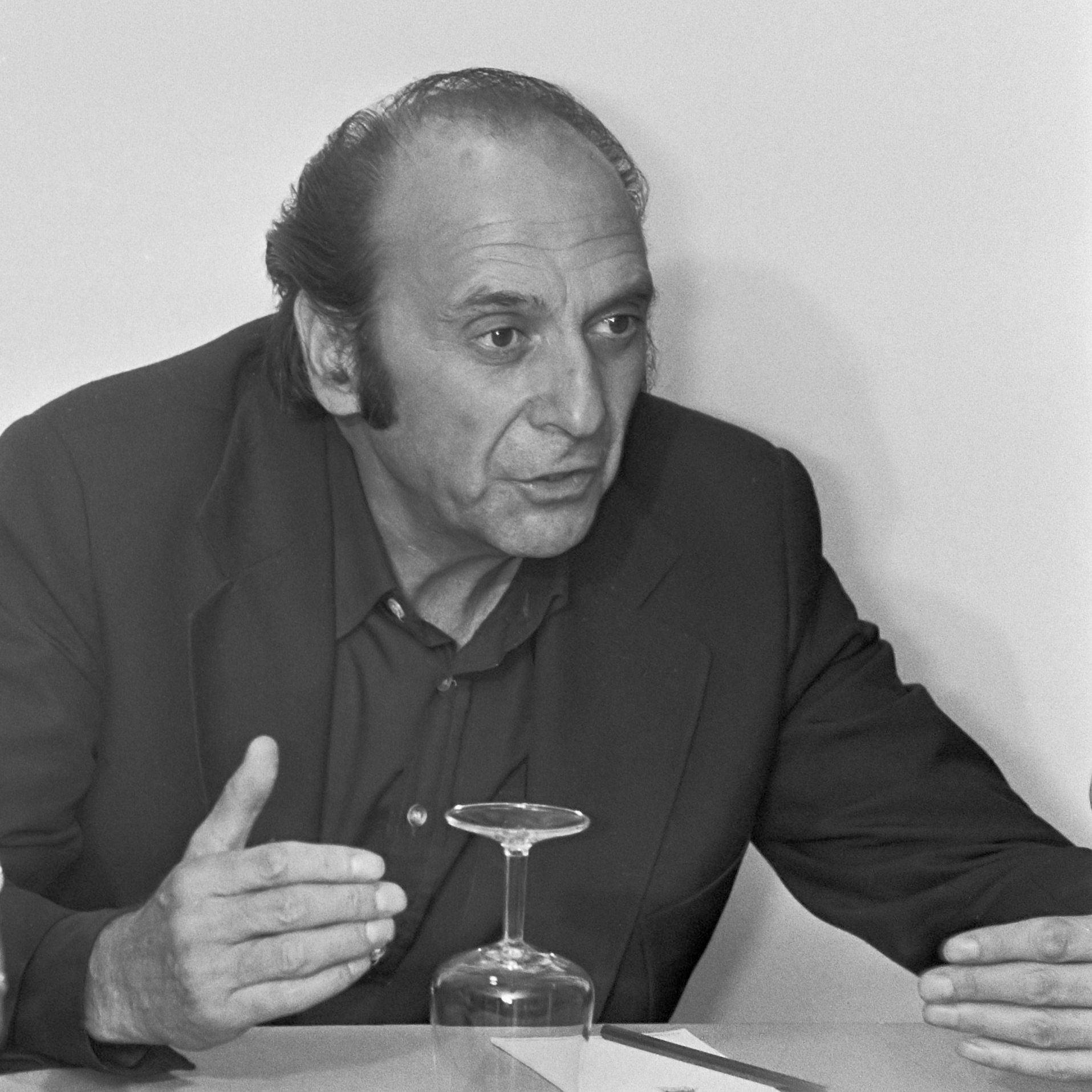 Persconferentie van enkele vakbonden i.v.m. de toekomst van het vezelbedrijf Enka Glanzstoff m.b.t. het behoud van arbeidsplaatsen en het rapport van bureau Kinsey daarover. Charles Levinson van de chemievakbond ICF 26 augustus 1975